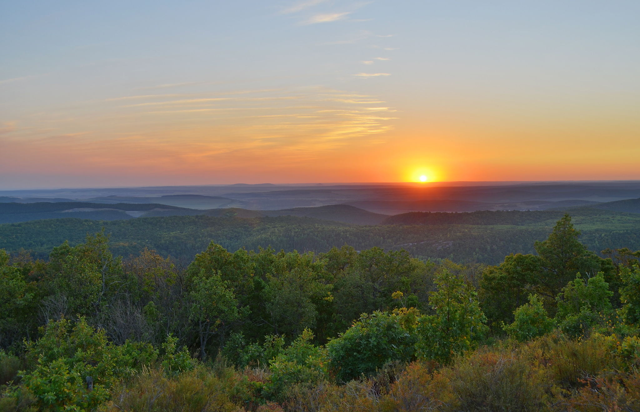 Sunset from Mt.